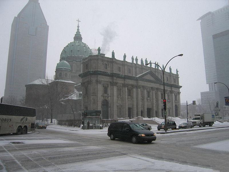 Basílica-Catedral "María Reina del Mundo", en Montreal, Quebec.